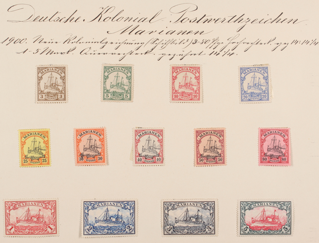 Briefmarken, montiert auf einen extra dafür vorgesehenen Bogen. Zum Teil vorher auf einen zweiten, kleineren Träger aufgebracht. Auf jedem Blatt Handschriftlicher Vermerk zu Herkunft der Marken (Jahreszahl und geographischer Bezug). Insgesamt 56 Marken auf fünf Blättern. Deutsche Kolonial Postwerthzeichen Marianen 1900. Neue Kolonialzeichnung (Schiffbild) 3–80 Pfge Hochrechteck. gez 14:14'/4 1–5 Mark. Querrechteck. gezähnt 14'/4. Abkürzungen: Hochrechteck.: Hochrechteckig Querrechteck.: Querrechteckig gez: gezähnt